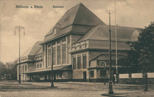 Mulheim-sur-le-Rhin, la gare (1910)